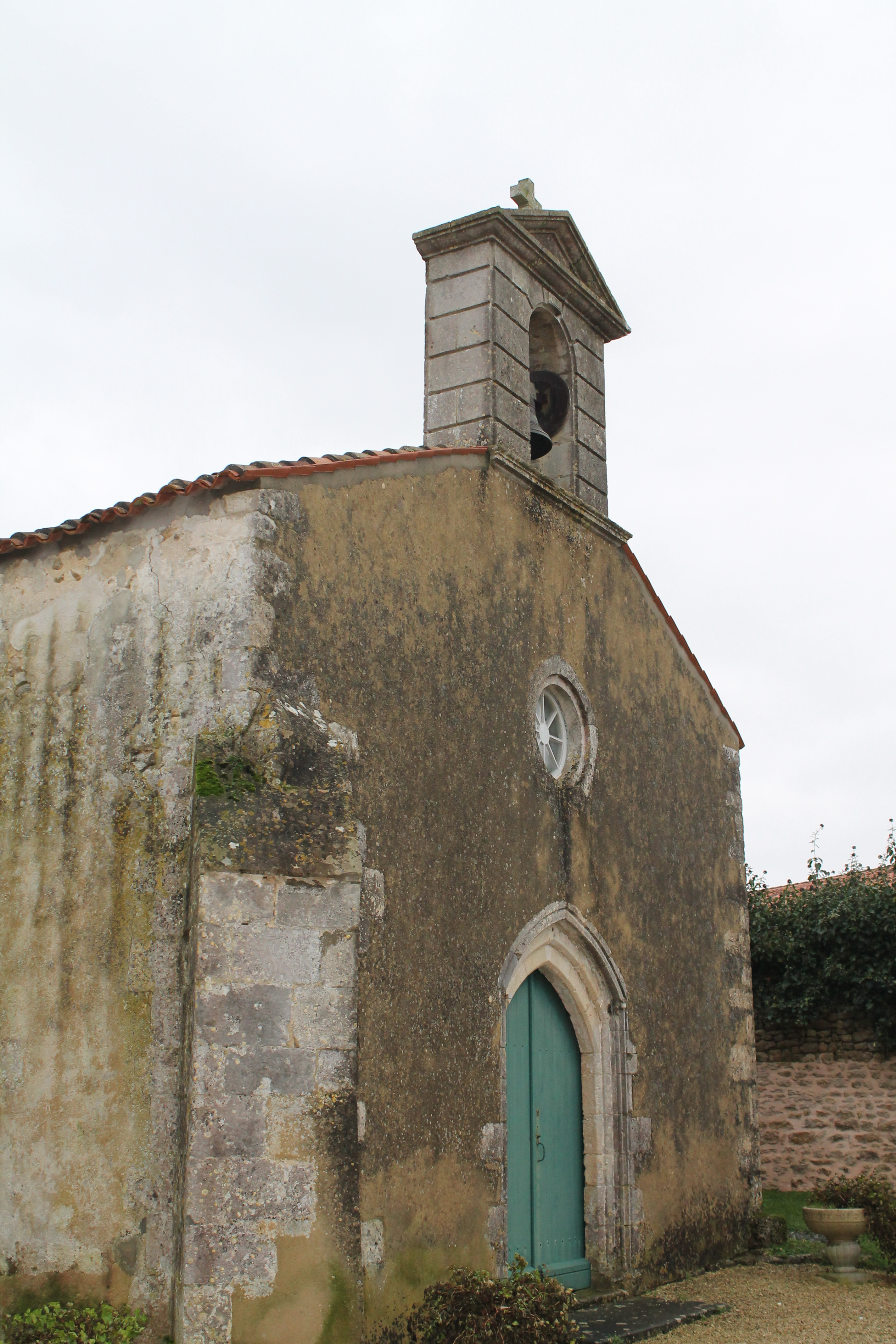 Église de Loire-les-Marais - Google Maps - Google Earth